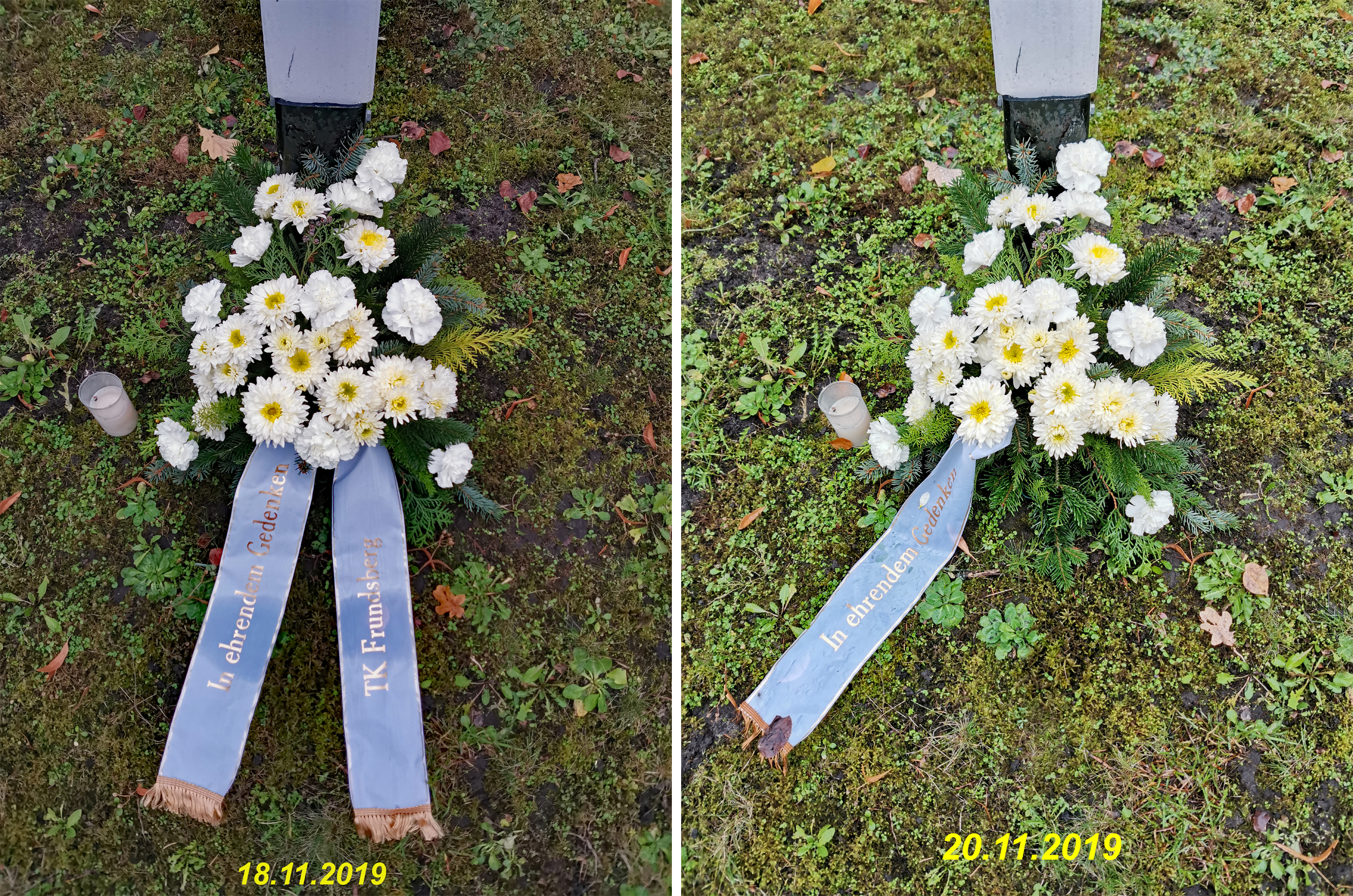 Blumengebinde der "Frundsberger" auf dem Soldatenfriedhof in Spremberg. Links Original, Rechts mit abgeschnittener Schleife